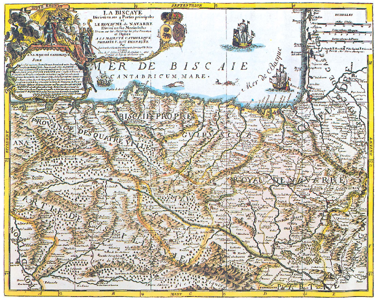 “La Biscaye Divisée en ses 4 Parties principales et Le Royaume de Navarre Divisée en ses Merindades”. J. Nolin. 1762.